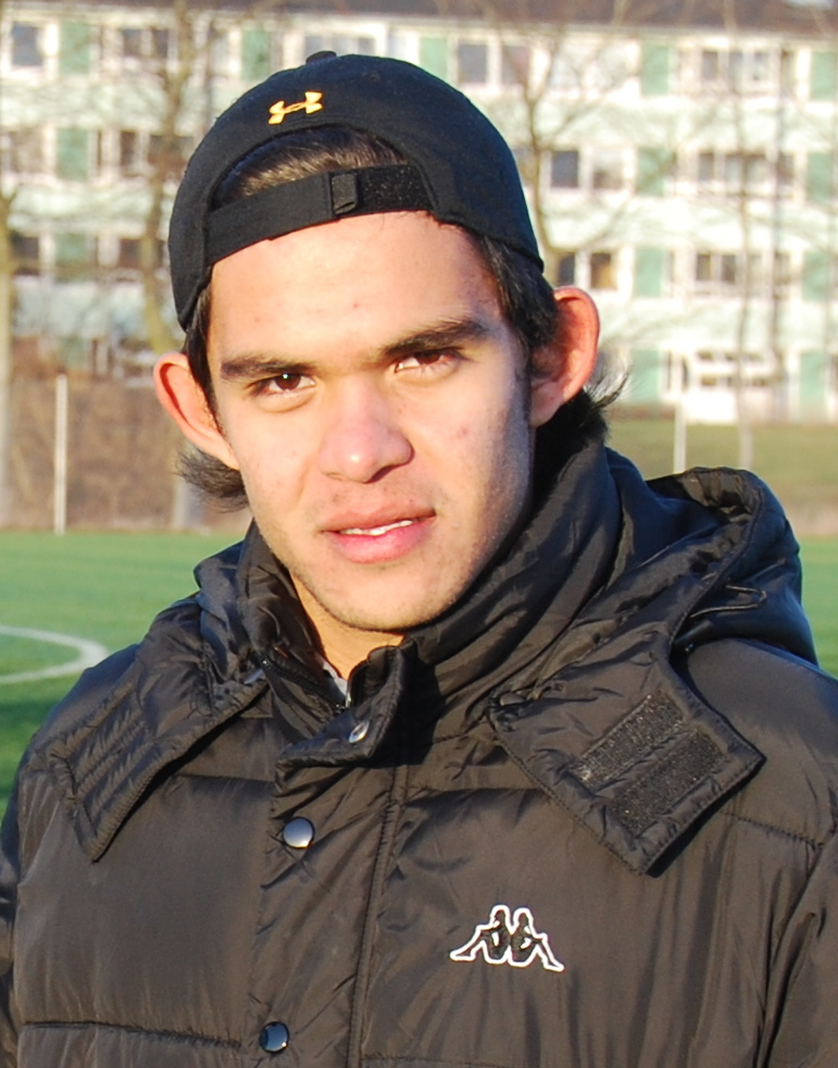 Fodboldspilleren Andrés Flores fra Viborg FF. Her på VFFs træningsanlæg på Kirkebækvej i Viborg.